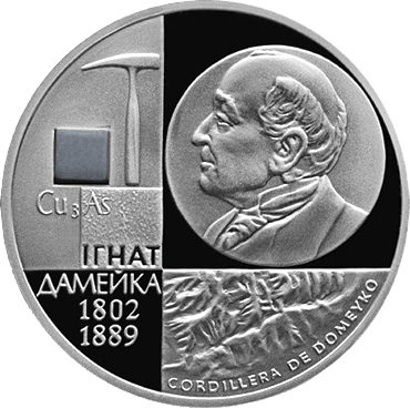 Беларуская (тарашкевіца): Памятная манэта, прысьвечаная 200–годзьдзю з народзінаў Ігната Дамейкі